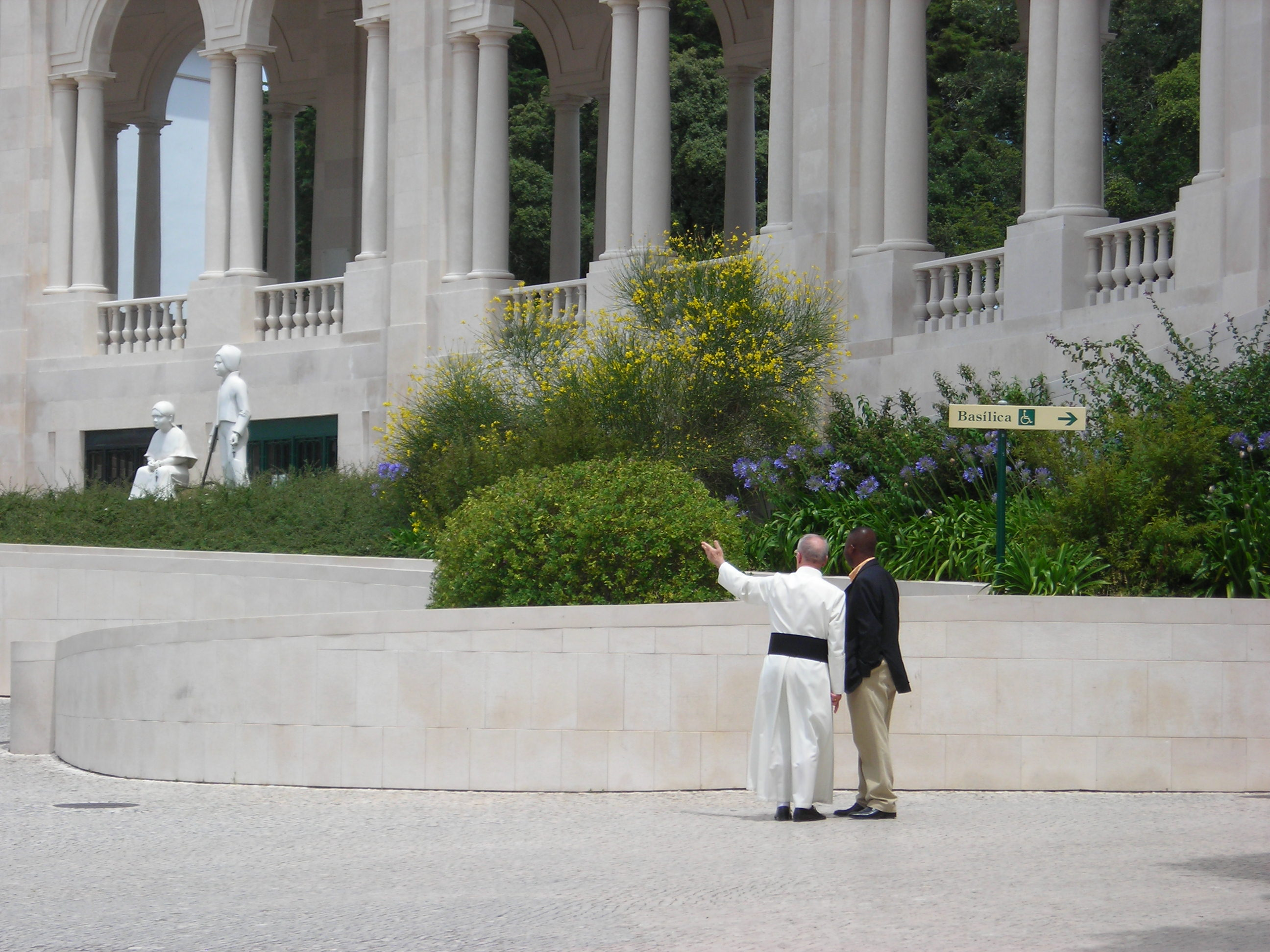 Santuário de Fátima